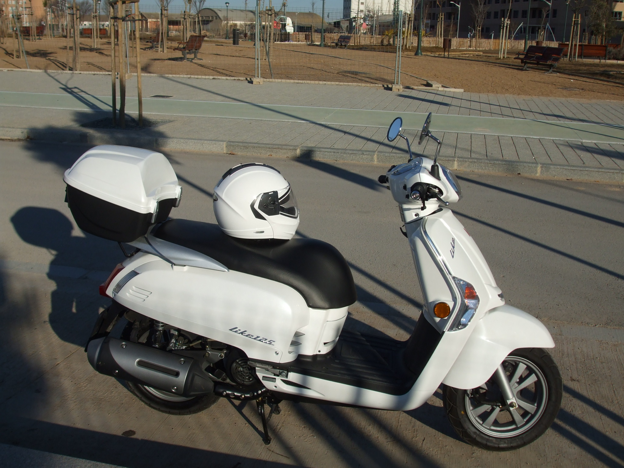 Motocicleta tipo scooter de la marca Kymco, modelo Like 125